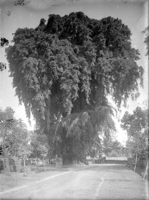 Negatief. Straatgezicht met waringin in Marga